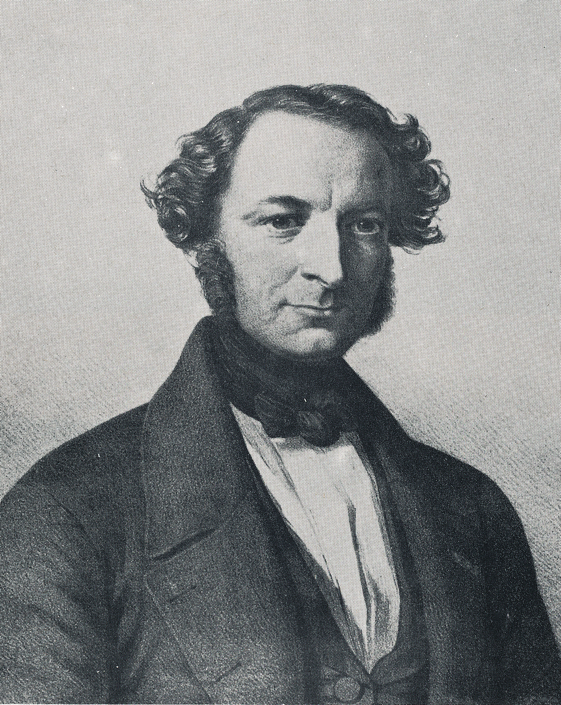 Carl Theodor August Graf von Scheel-Plessen Datum: um 1860 Quelle: Scan aus dem Buch "Die Plessen", C.A. Starke Verlag, Limburg, 1971 Urheber: unbekannt / Portait wurde (von mir) eingescannt Hinweis: Urheberrechtsschutz nach 70-Jahren abgelaufen